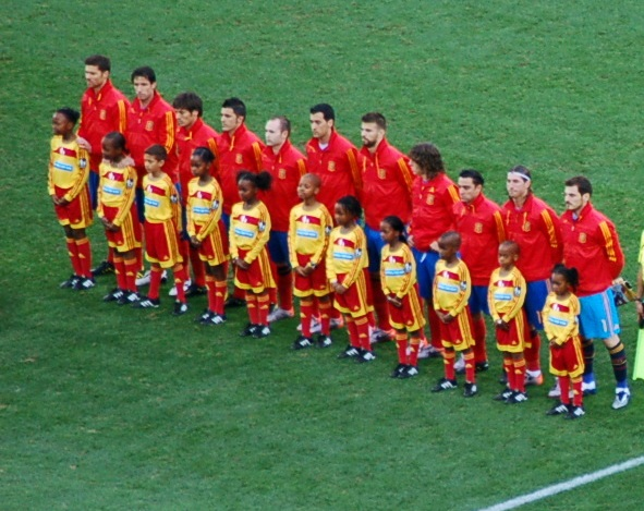 Selección de España, antes del encuentro contra Suiza correspondiente a la Copa Mundial de la FIFA de 2010